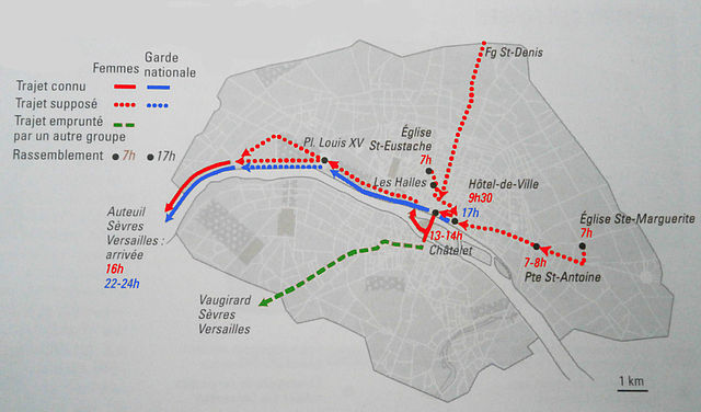 Carte retouchée tirée de "Atlas de la Révolution Française, Tome 11 : Paris, édité par Serge Bonin, Émile Ducoudray, Alexandra Laclau, Claude Langlois, Raymonde Monnier, Daniel Roche